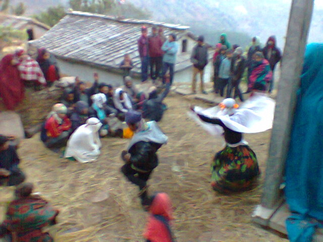 Maruni